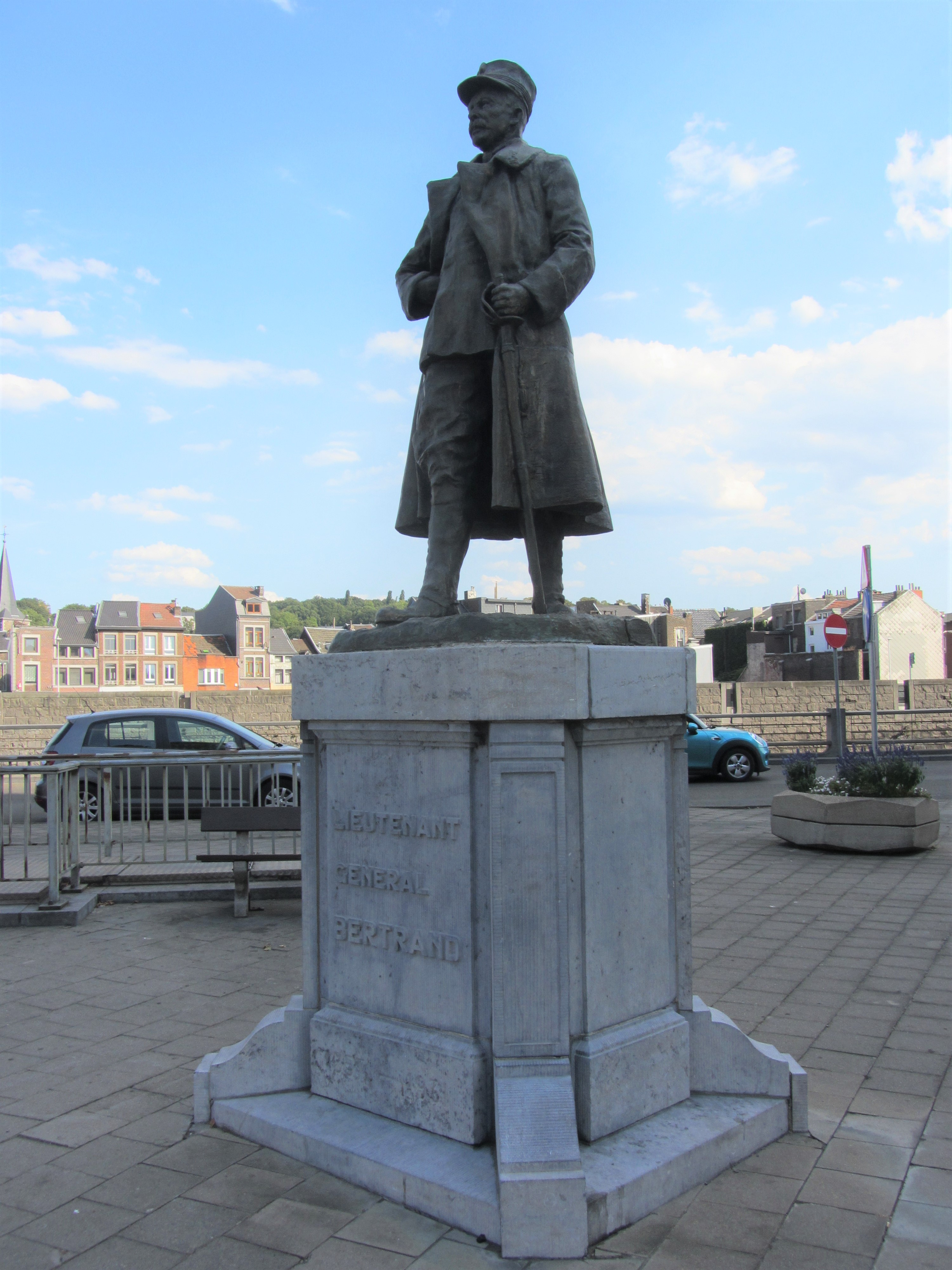 Monument du lieutenant général Joseph Bertrand place Théodore Gobert, près du pont d'Amercoeur à Liège.